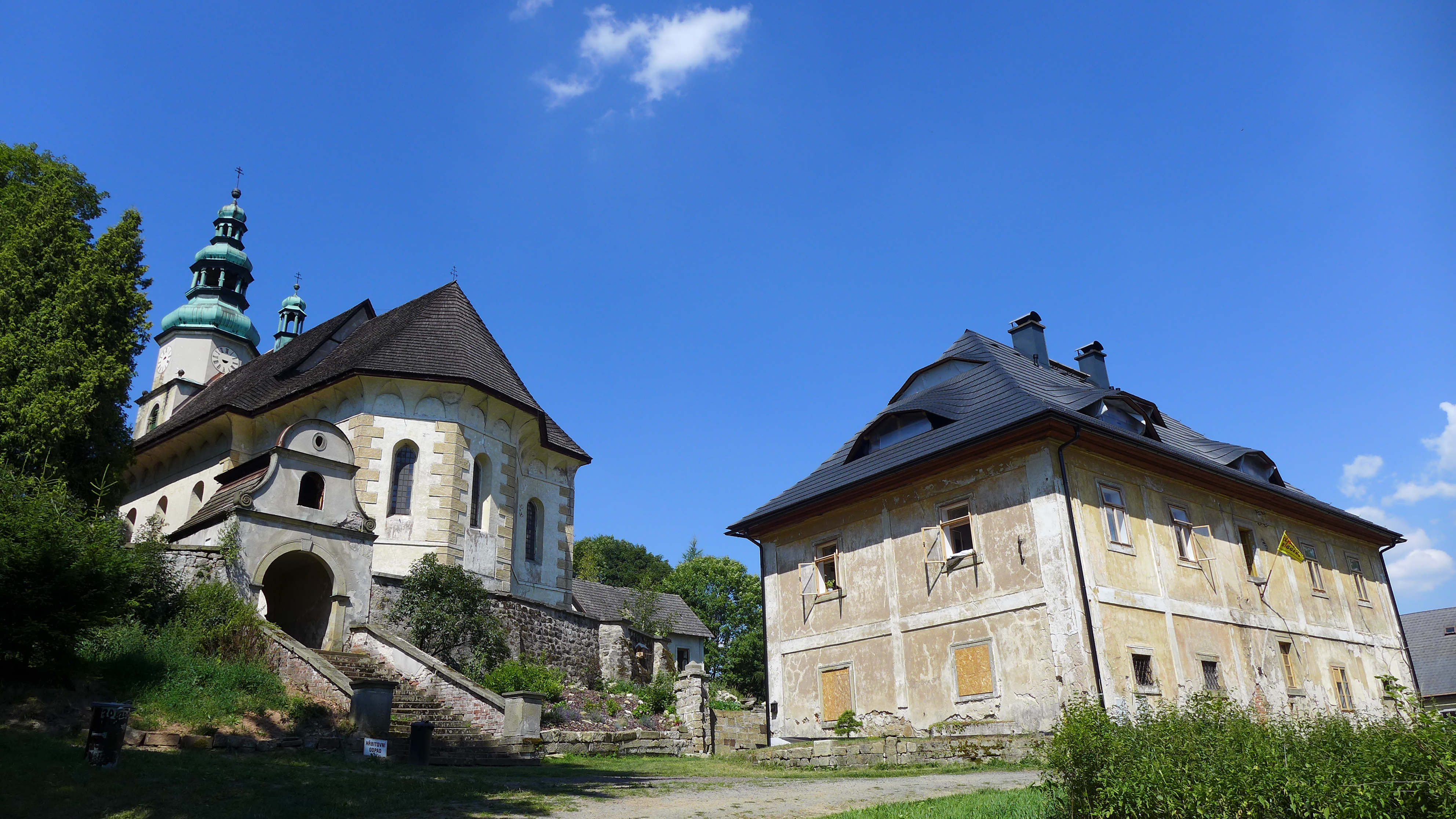 Kostel Nejsvětější Trojice, Zdoňov.